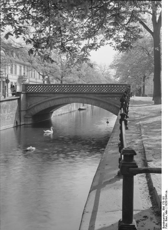 Potsdam.- Am Kanal bei der Grünstraße